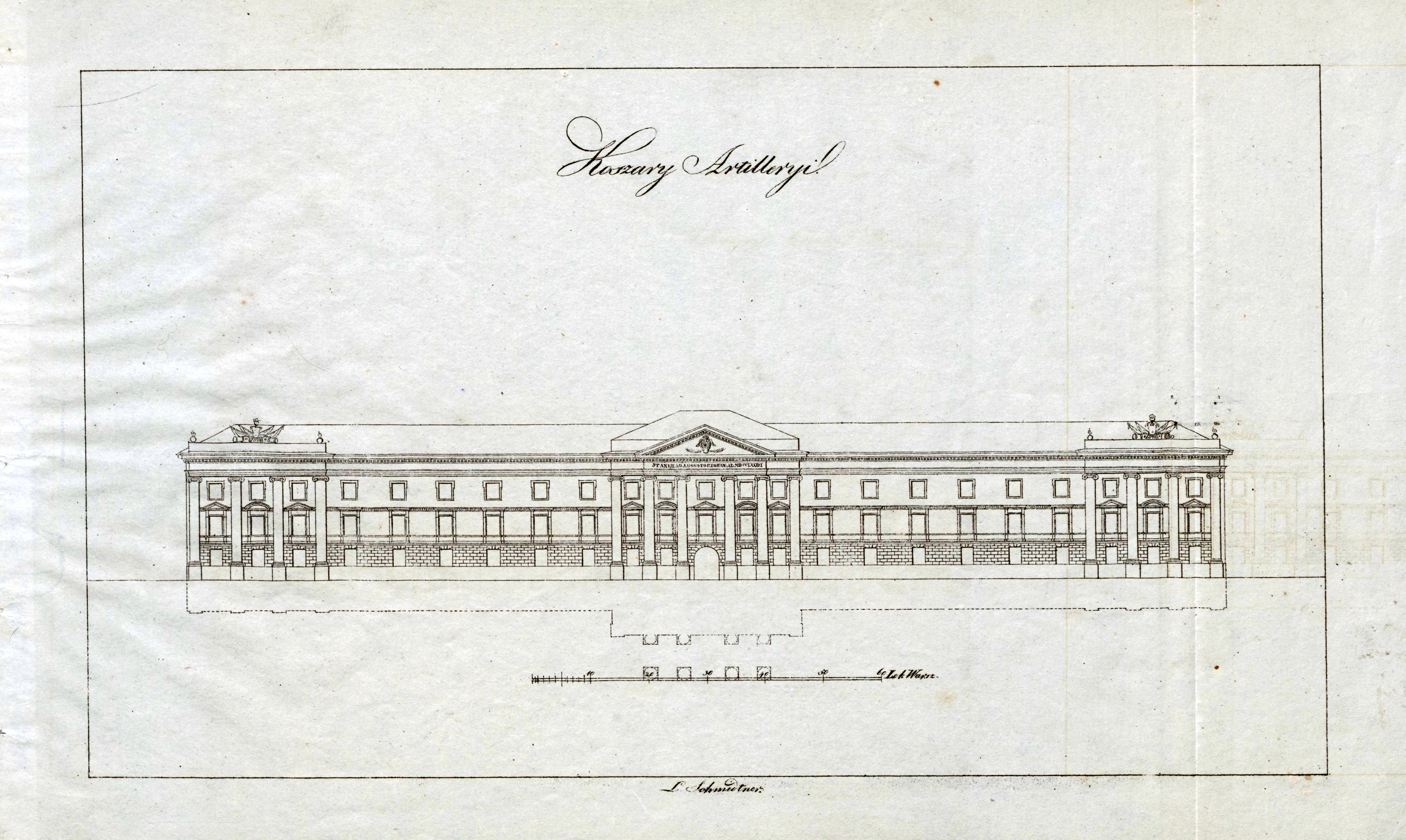 Szkic fasady Koszar Wołyńskich w Warszawie autorstwa Leonarda Schmidtnera. W późniejszym okresie rozebrano kolumnowy portyk z tympanonem zdobiący główne wejście od ul. Gęsiej.